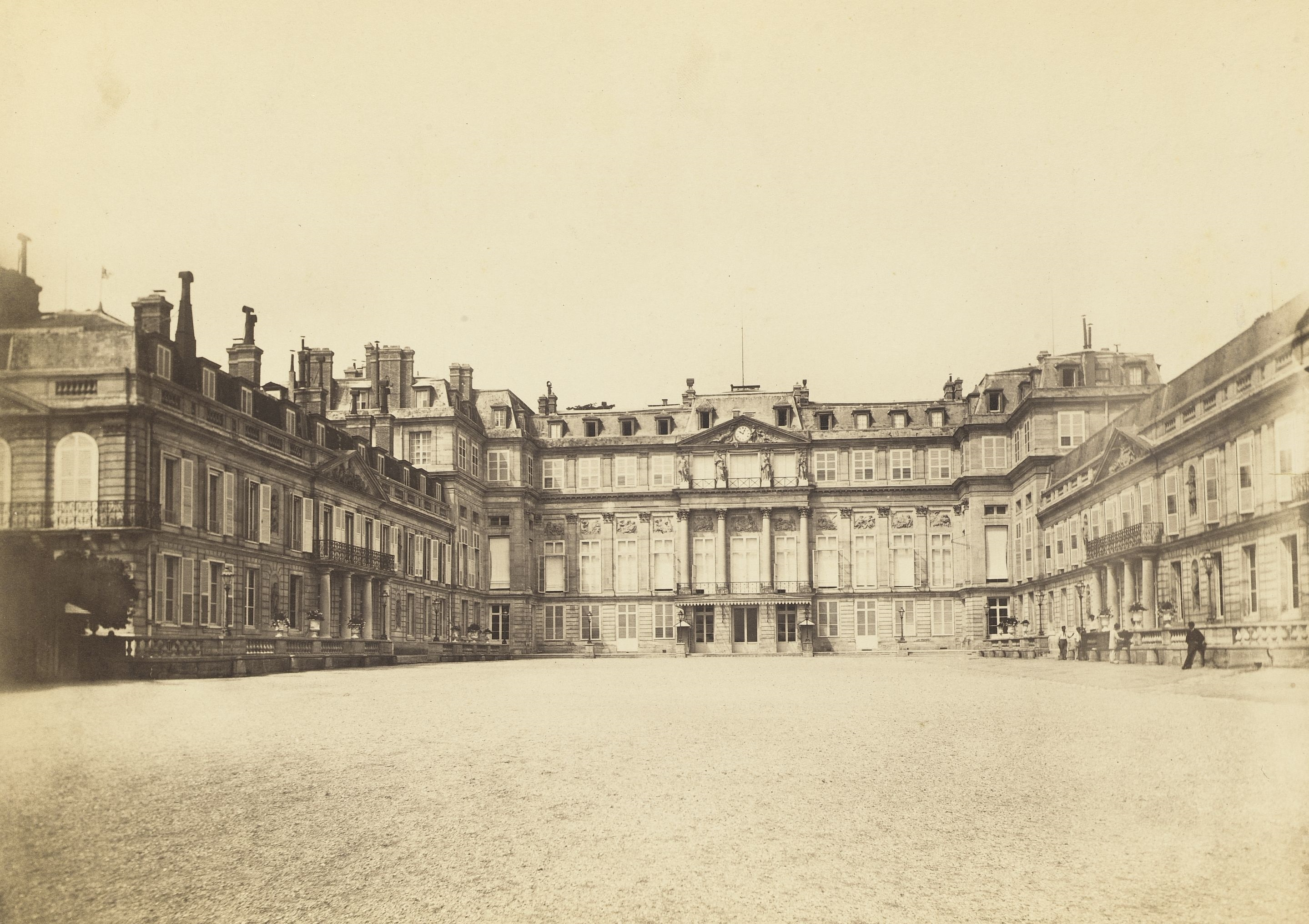 Vue de la cour d'entrée du Château de Saint-Cloud